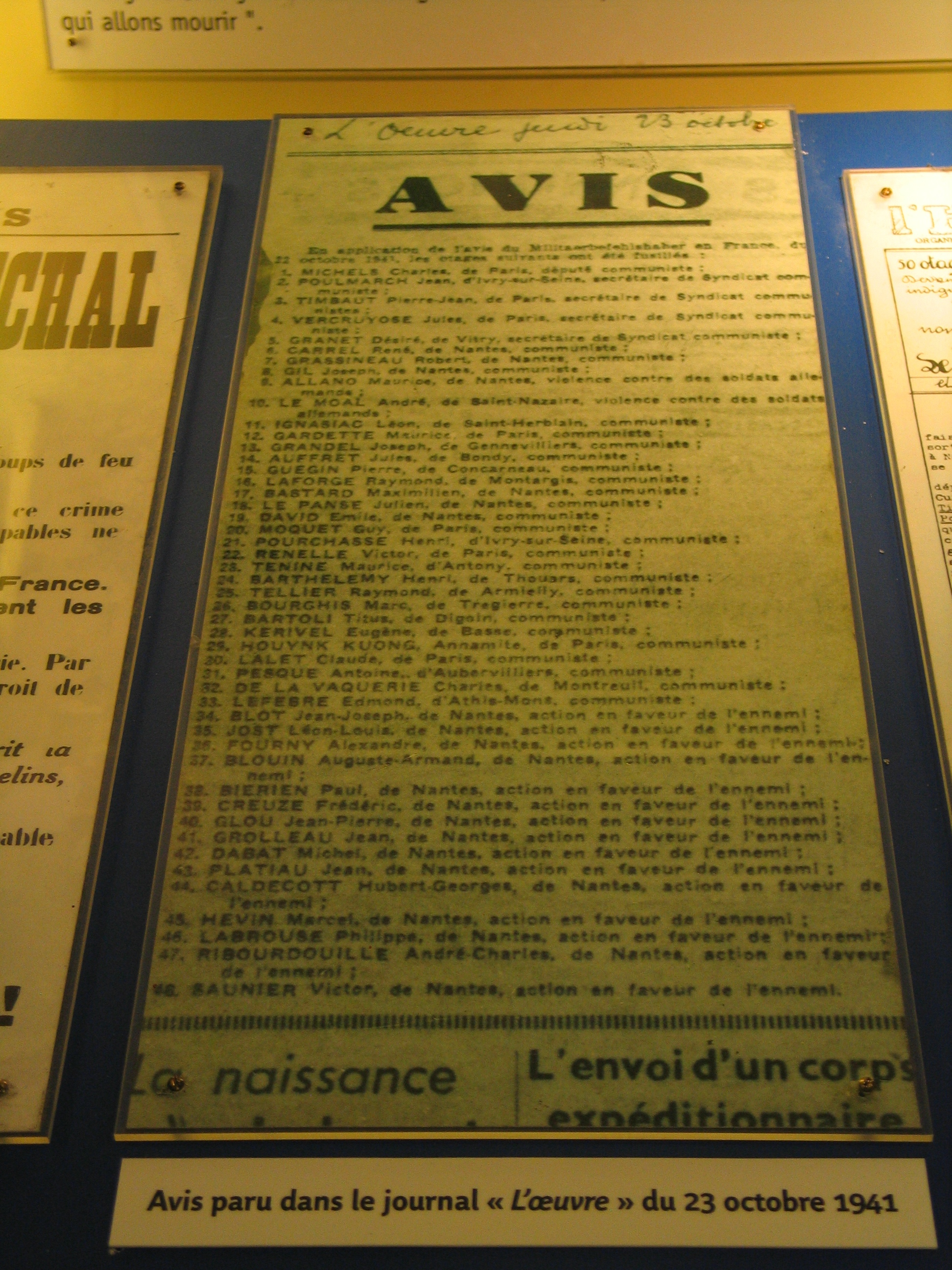 Exposition métro Guy Môquet, Paris. Avis d'exécution d'otages par les nazis le 22 octobre 1941 paru dans le journal « L'Œuvre » du 23 octobre 1941.